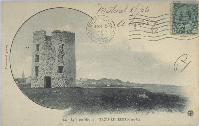 Vieux moulin pinsonneault14 1906 c